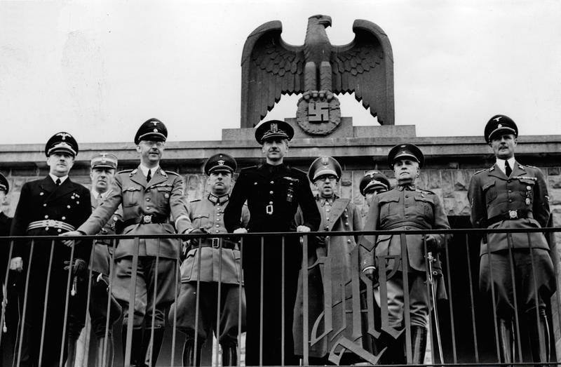 Oficiales españoles y alemanes en Berlín, durante la visita que realizó la delegación de la España franquista al cuartel general de la División Leibstandarte-SS «Adolf Hitler». En la fotografía aparecen: Heinrich Himmler: Reichsführer-SS y jefe de la policía alemana. Ramón Serrano Suñer: Ministro de Asuntos exteriores de España. Eugenio Espinosa de los Monteros: General, embajador de España en Berlín. Antonio Sagardía Ramos: General, jefe de la Policía Armada.